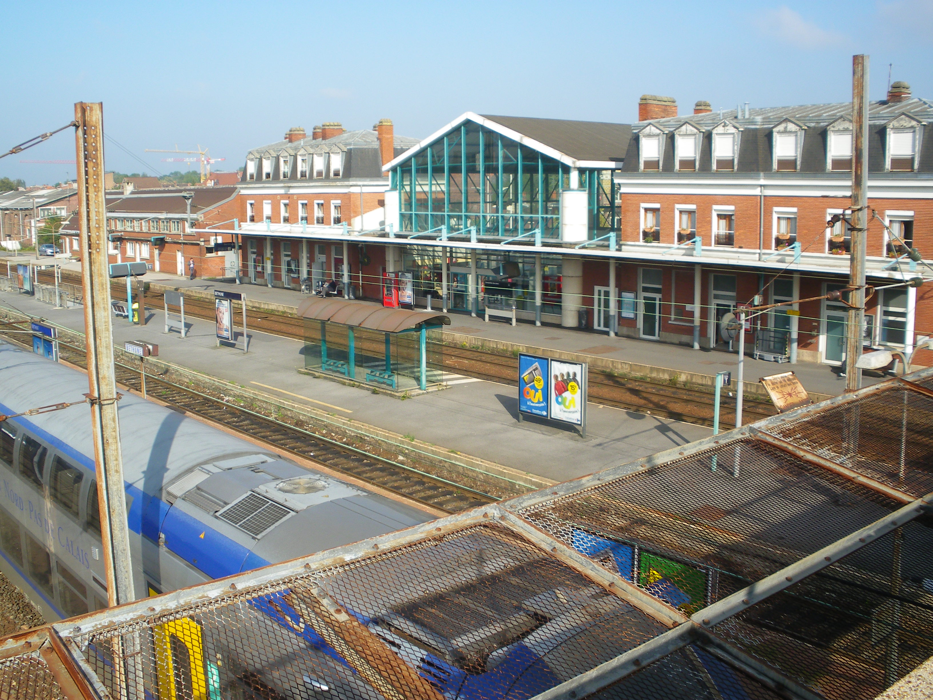 Vue de la gare de Béthune depuis la passerelle attenante.